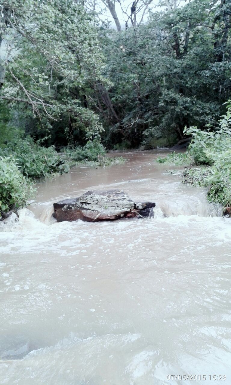 Palmácia-CE